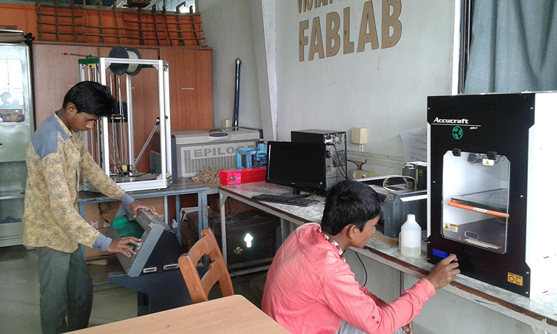 fablab मध्ये काम करताना मुले